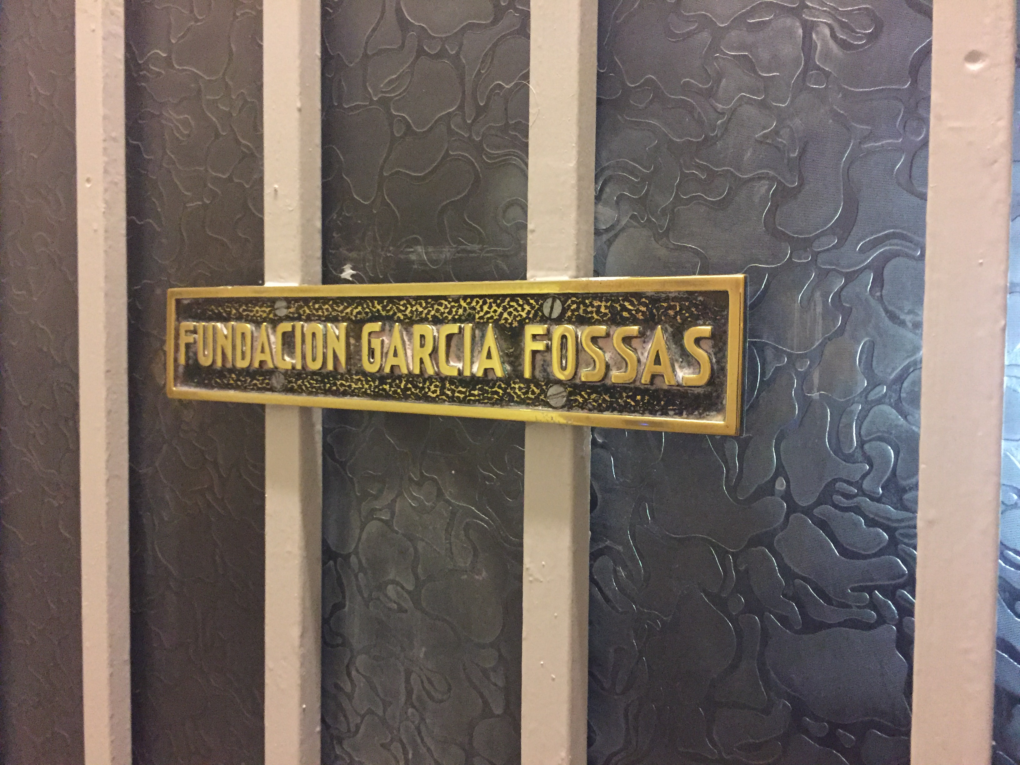 Fundació Garcia Fossas que té la seu social és a l'Avinguda Diagonal, 460